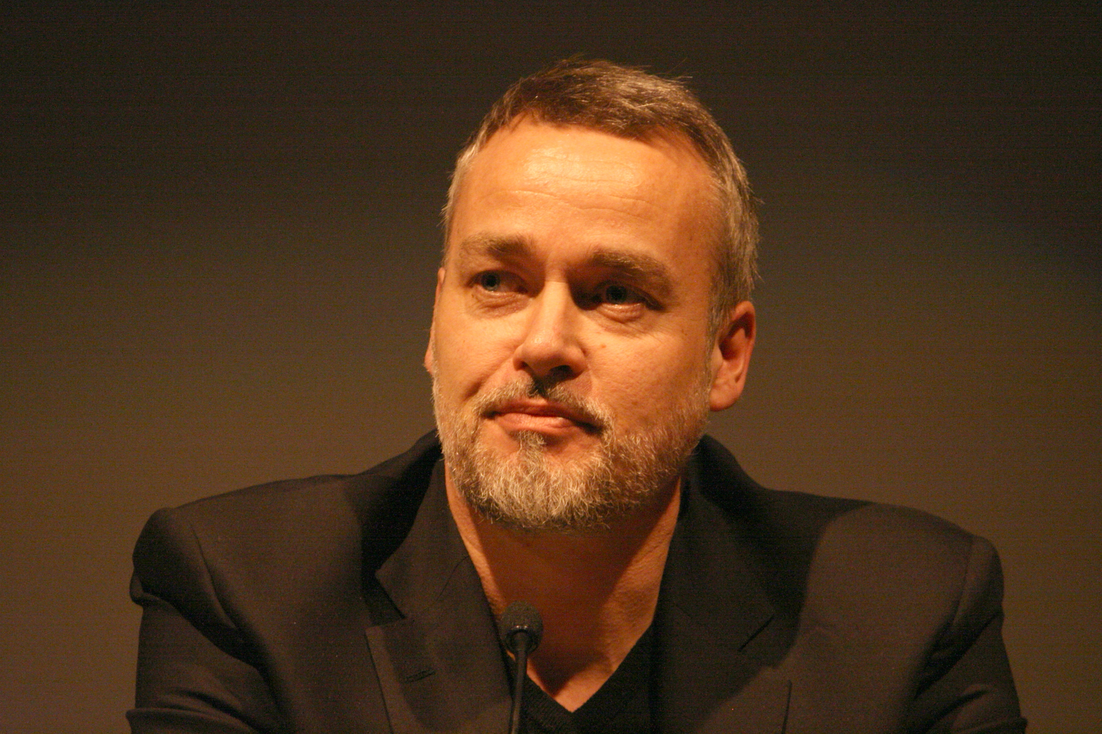 Jan Omdahl under paneldebatten i forbindelse med førpremieren på filmen Urospredere.